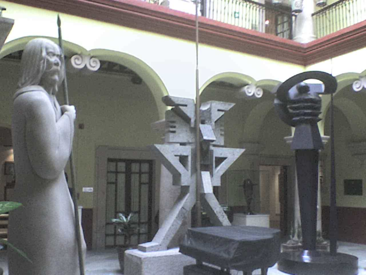 Museo Iconográfico del Quijote, Guanajuato, Guanajuato